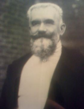 Photo du chirurgien Léon Gernez (1875-1936).